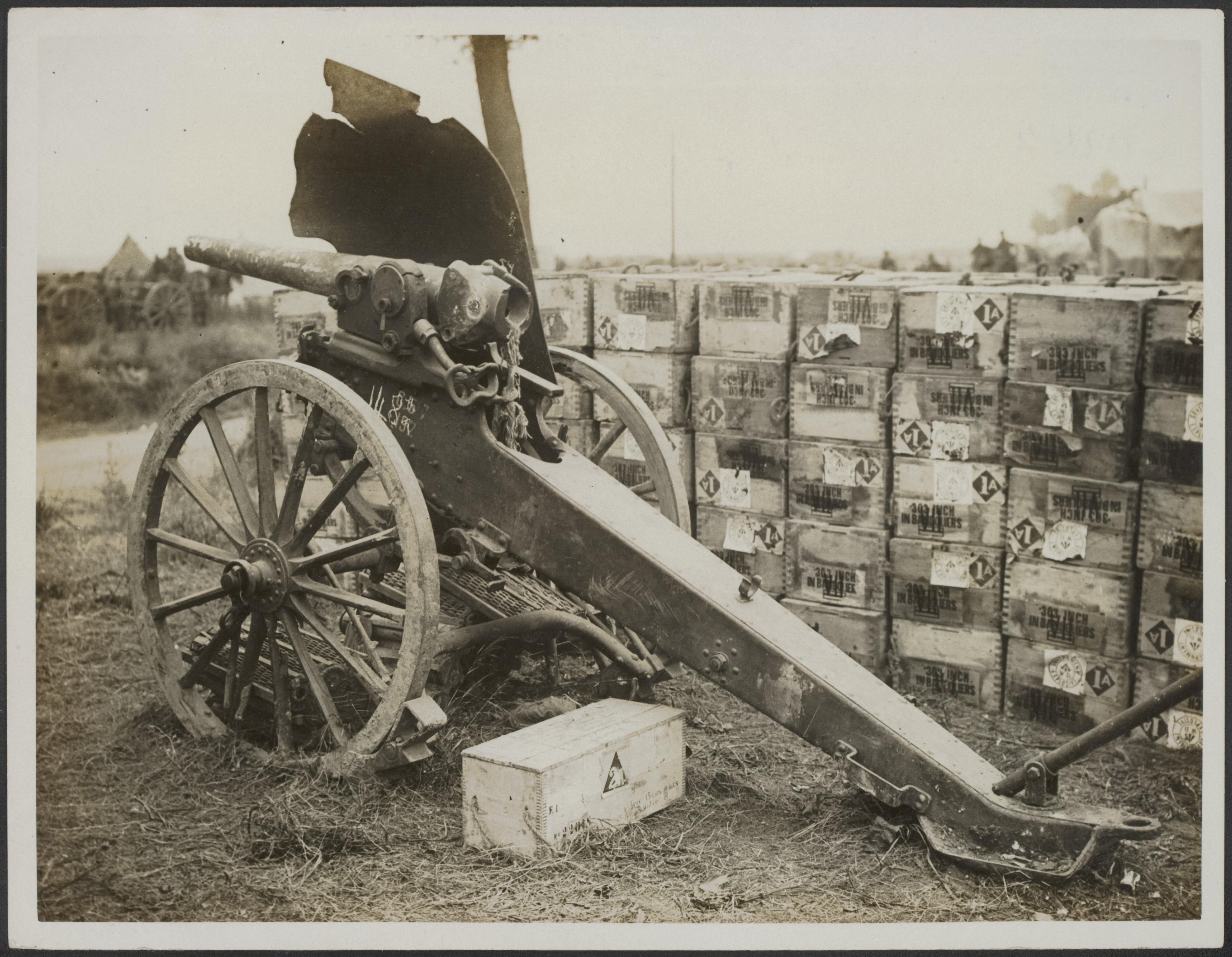 Collectie / Archief : Fotocollectie Eerste Wereldoorlog Reportage / Serie : The great British advance in the west Beschrijving : A captured German gun. Half its shield has been destroyed owing to a direct hit by our artillery Annotatie : De grote Britse opmars in het Westen. Een veroverd Duits kanon. De helft van het schild is verwoest dankzij een directe treffer van onze artillerie Datum : {1914-1918} Trefwoorden : eerste wereldoorlog, fronten, kanonnen, oorlogsbuit, verwoestingen Fotograaf : The Press Bureau Auteursrechthebbende : Public Domain logo Materiaalsoort : Foto (zwart/wit) Nummer archiefinventaris : bekijk toegang 2.24.09 Bestanddeelnummer : 158-2317